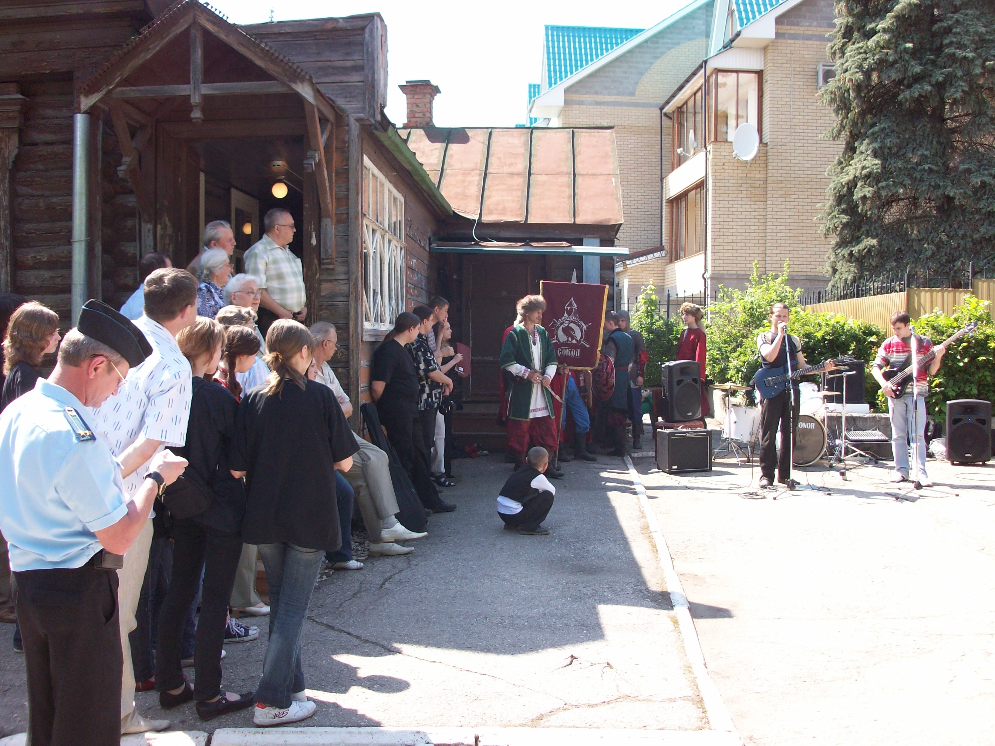 Мероприятие в честь 35-летия музея «Конспиративная квартира Симбирской группы РСДРП»